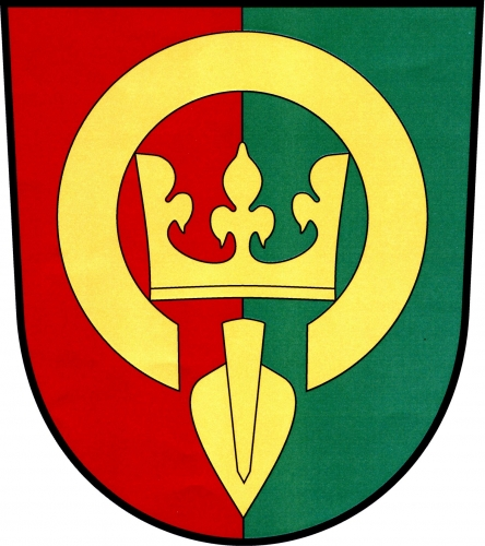 znak, Radětice, okres Příbram